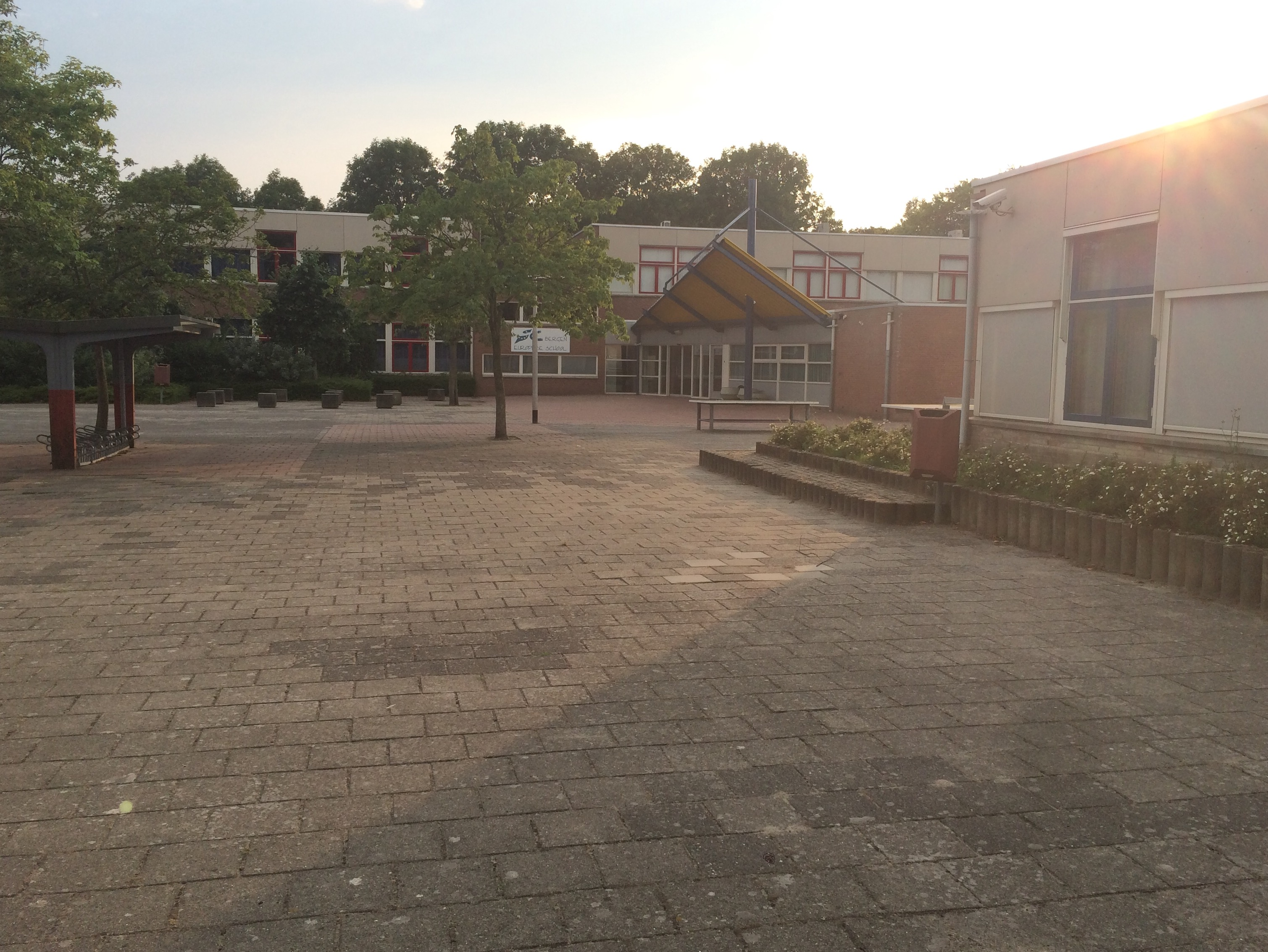 Europa Schule Bergen